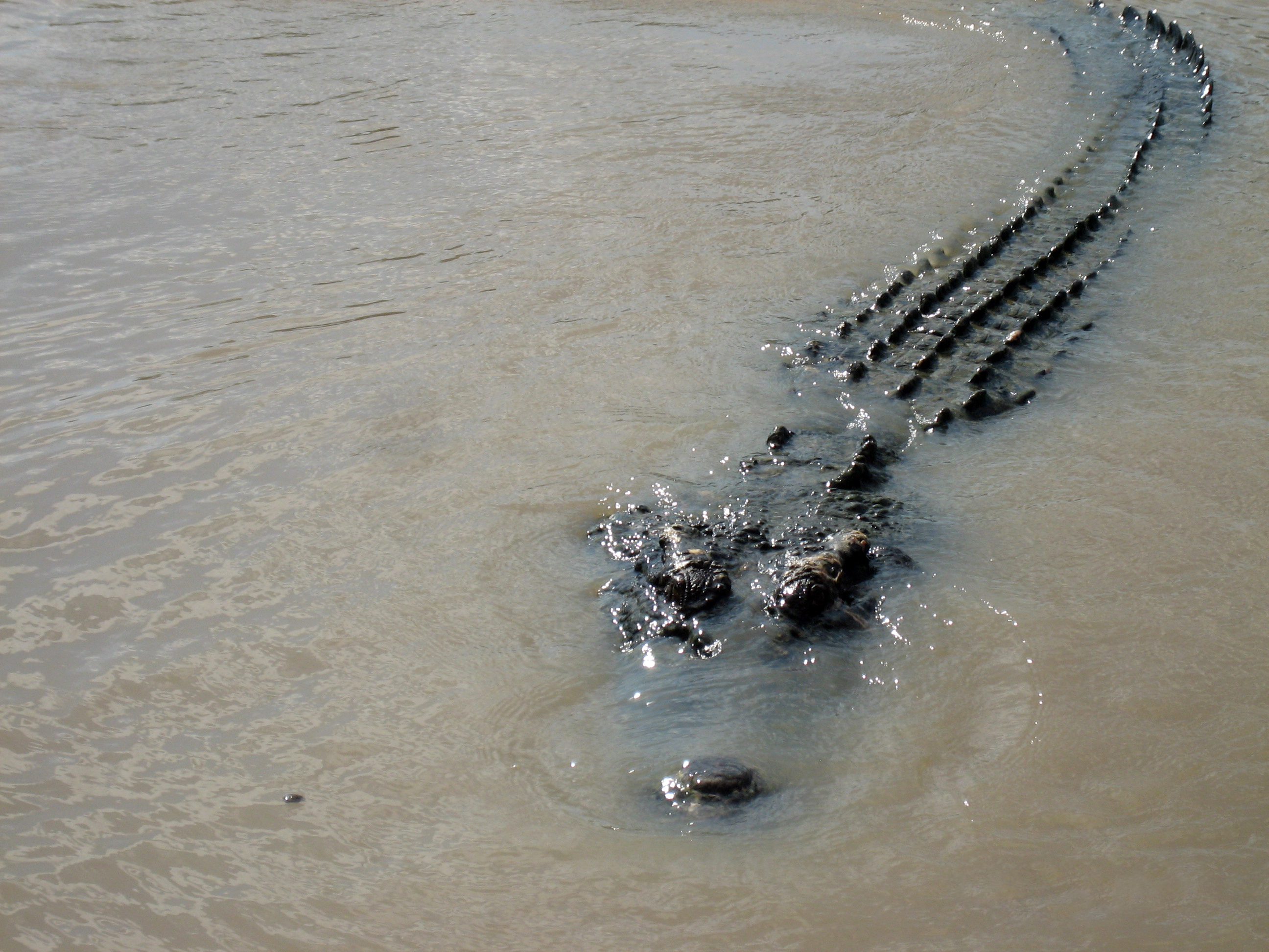 Adelaide River, NT.